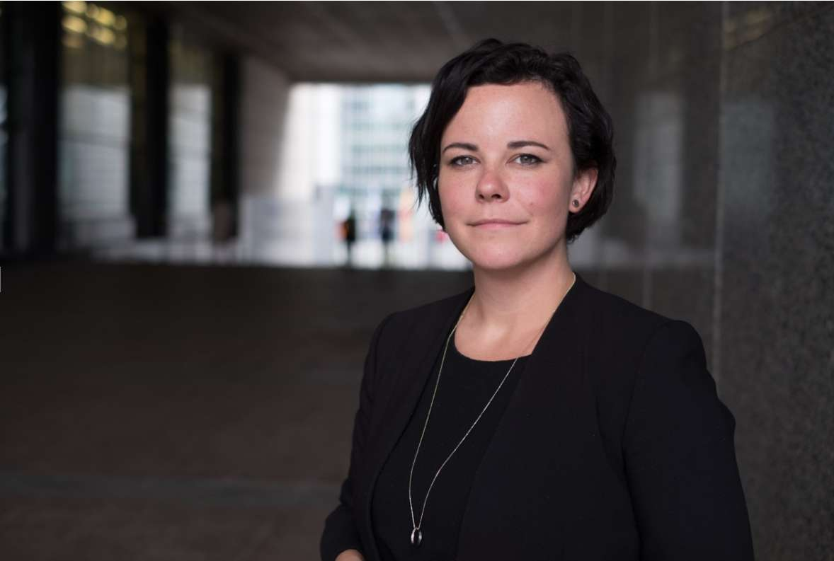 Bryssel 2017